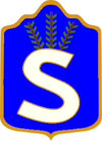 Suojeluskuntain Yliesikunnan käsivarsikilpi.